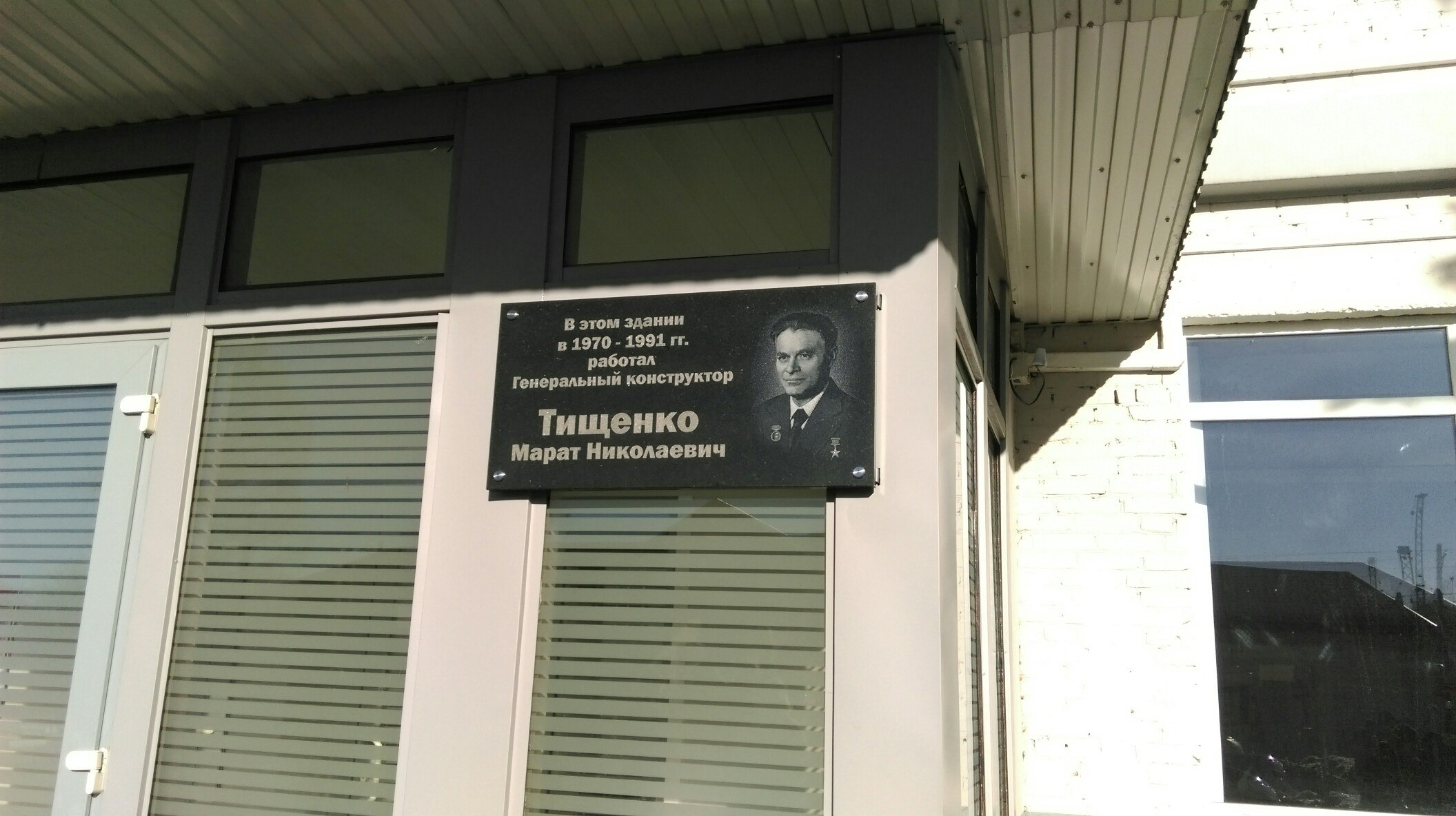 Мемориальная доска посвященная генеральному конструктору "МВЗ им. М.Л. Миля" М.Н. Тищенко